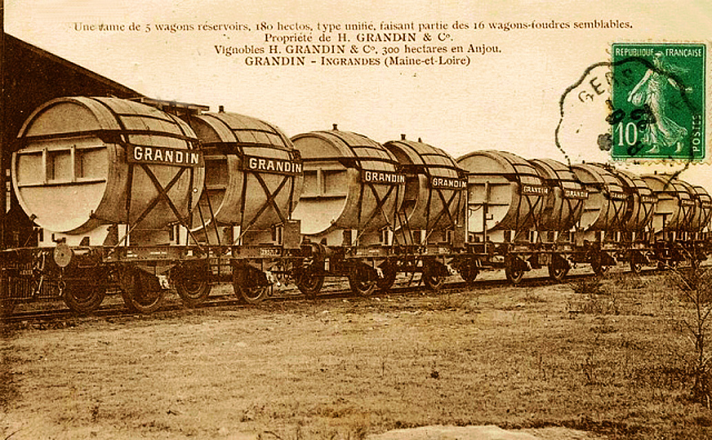 Vins Grandin en gare d'Ingrandes (Maine-et-Loire, France).